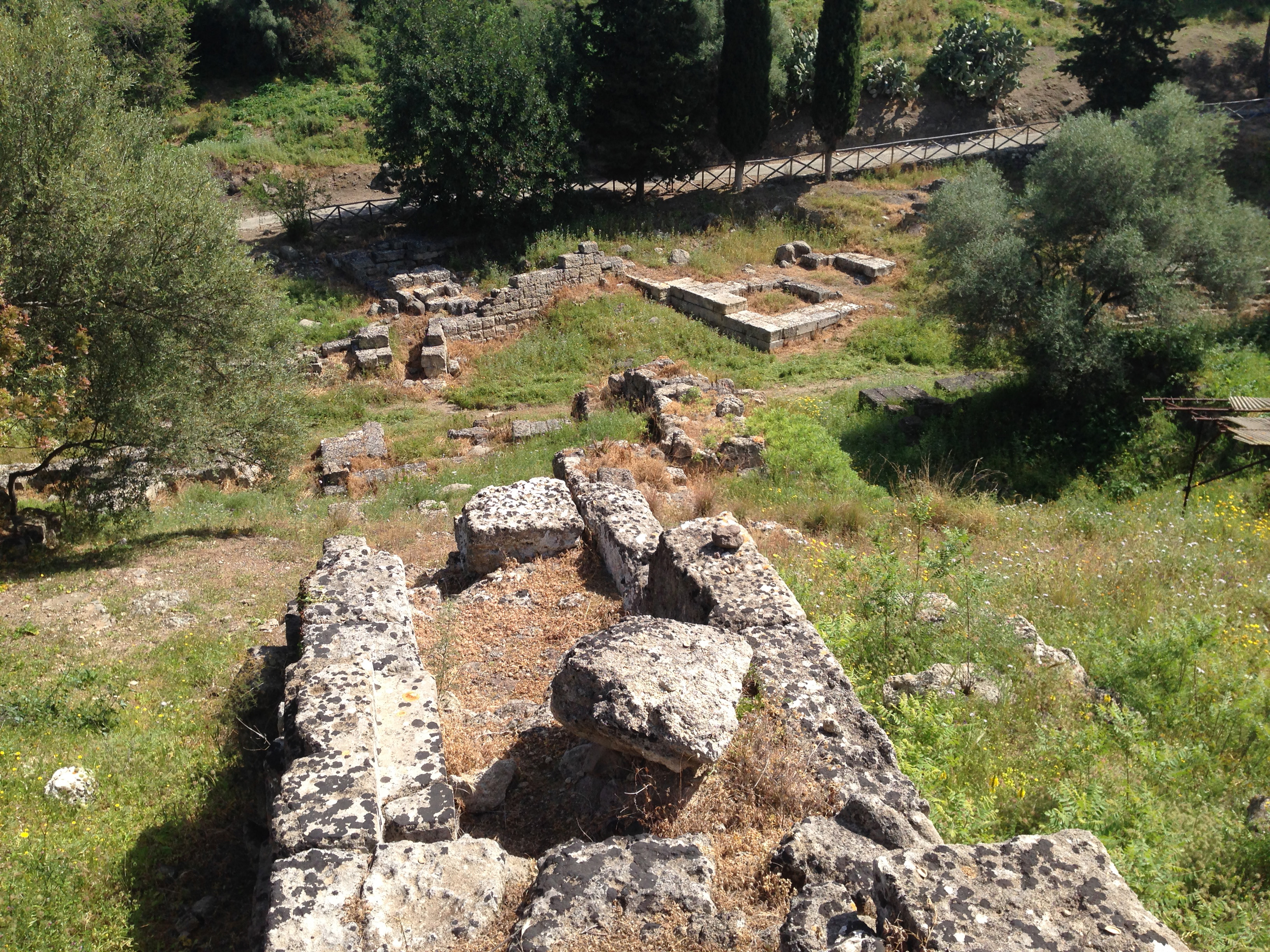 Ingresso a tenaglia con basamento di fortificazione.